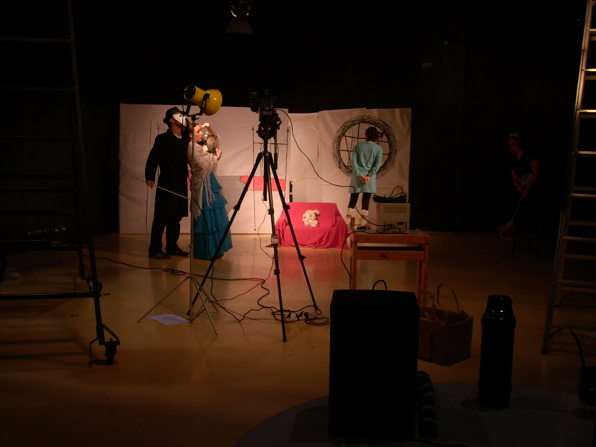 Trabajo práctico de estudiantes de la Licenciatura en Diseño y Producción Audiovisual